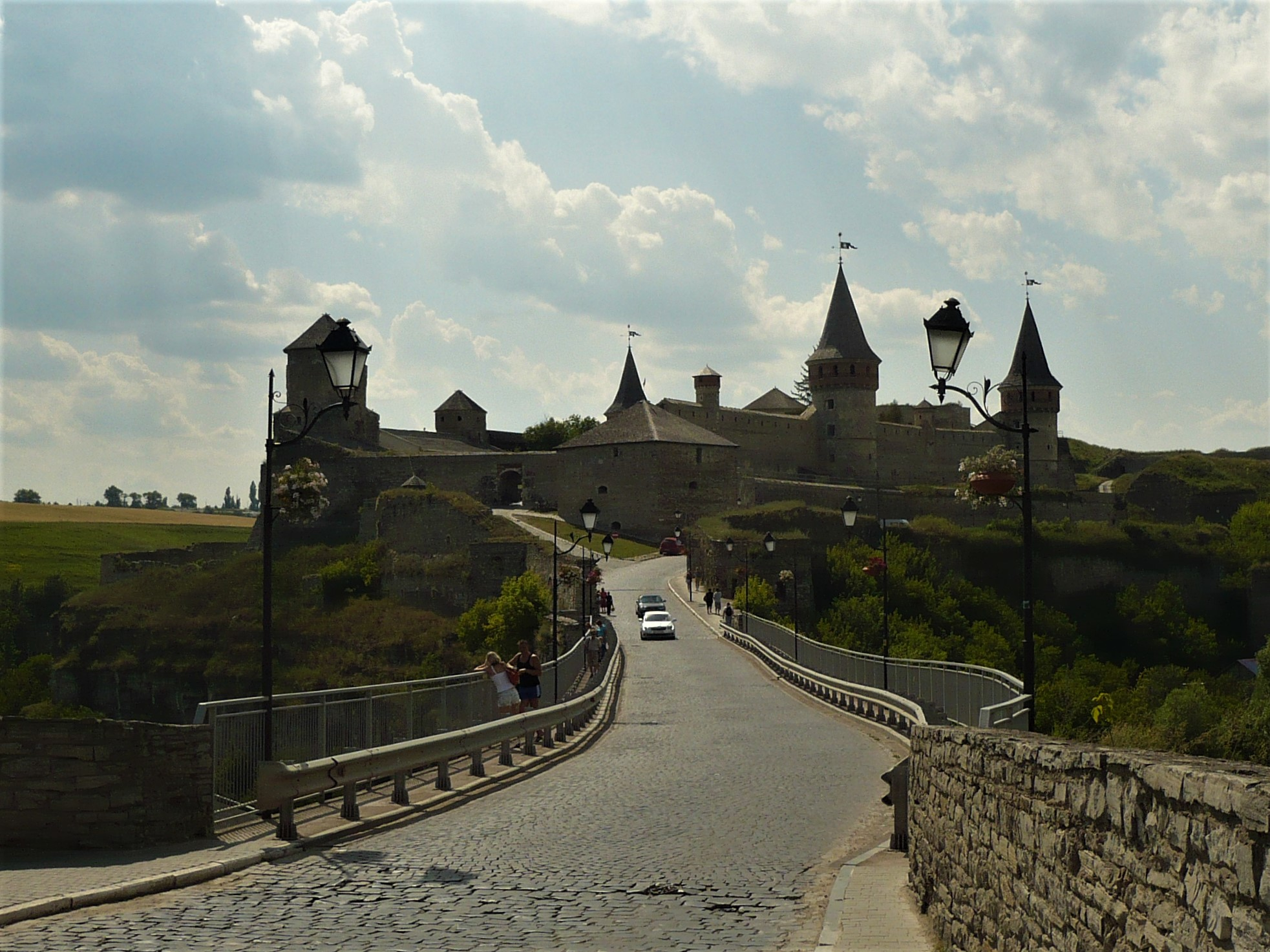 Twierdza w Kamieńcu Podolskim